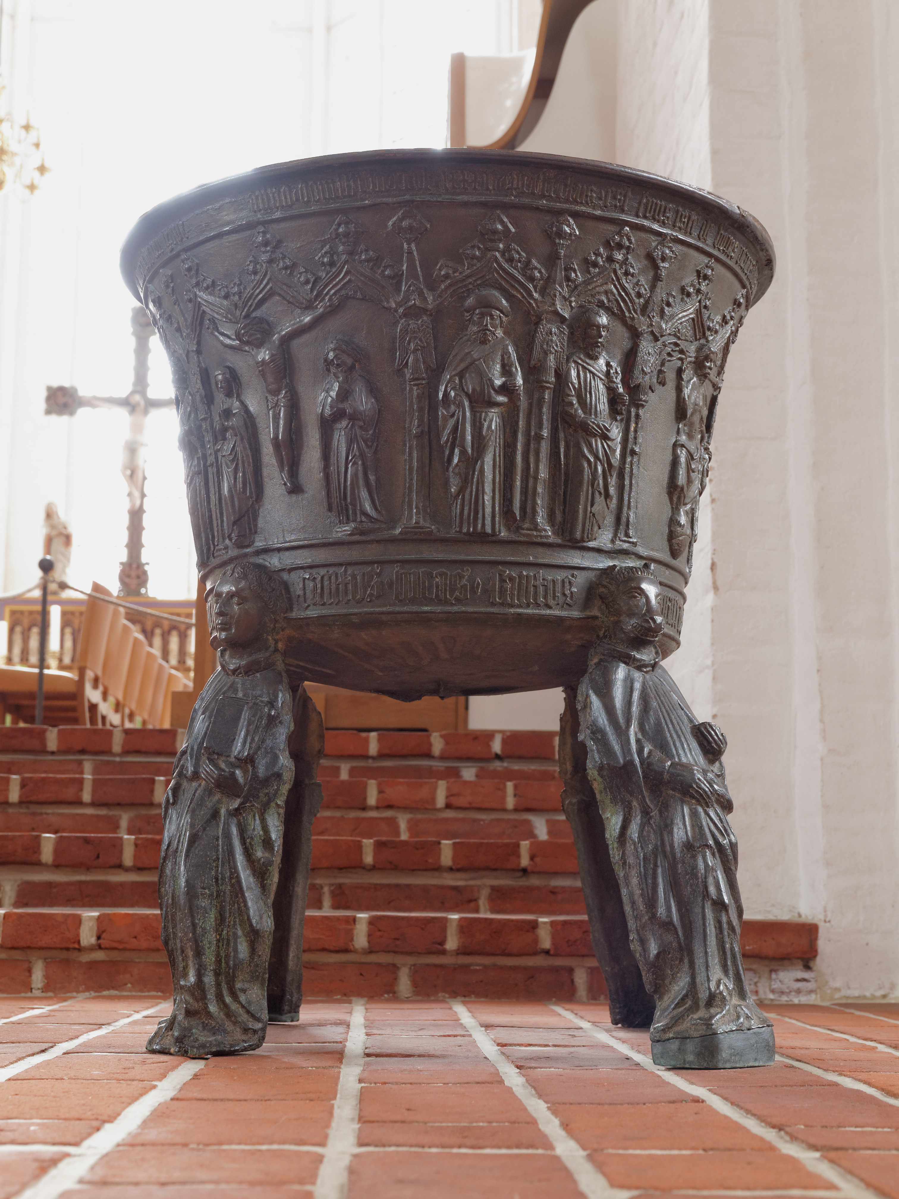 Bronzefünte von 1485 im Dom zu Haderslev, Jütland, Dänemark, Ansicht der Westseite